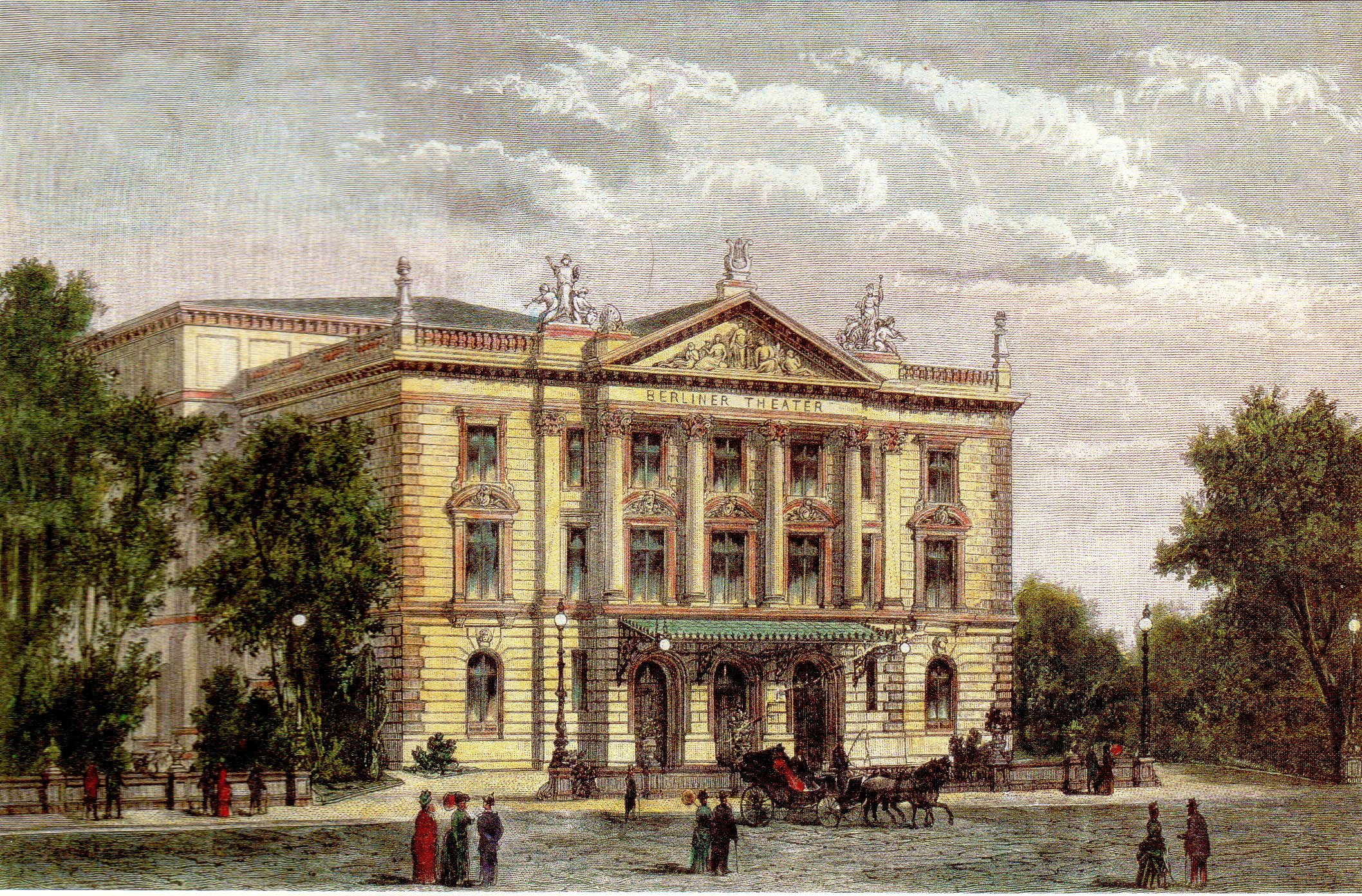 Das „Berliner Theater“ in der Charlottenstraße, Kolorierter Holzstich